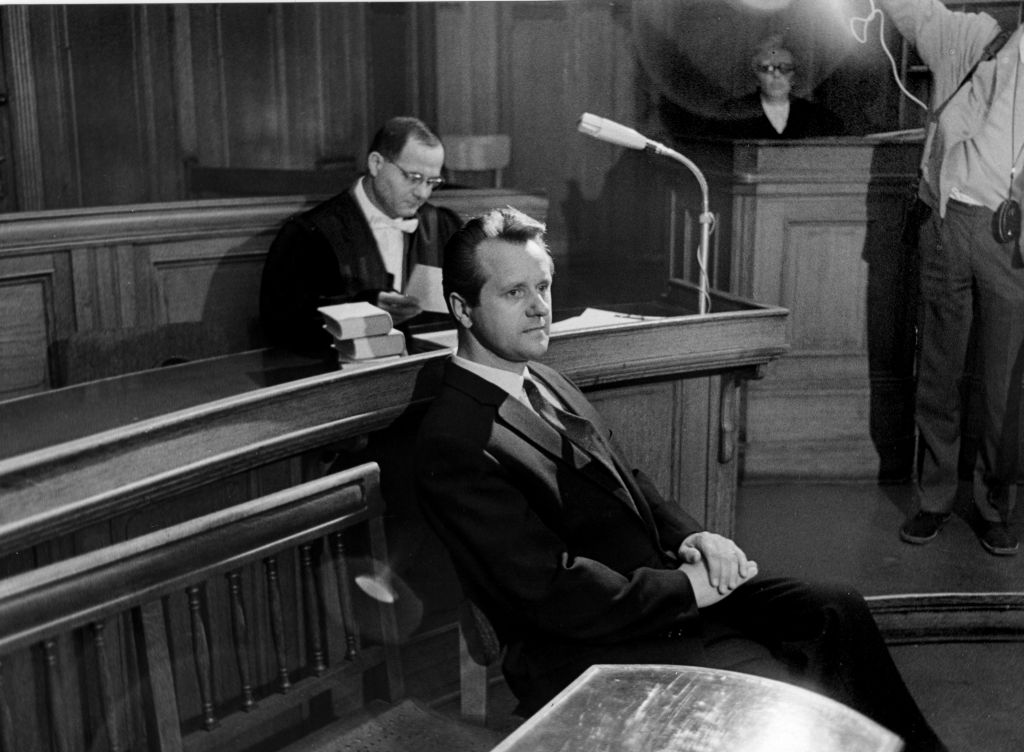 2001_03_0275.4239 Ludwig Binder: Studentenrevolte 1967/68, West-Berlin; veröffentlicht vom Haus der Geschichte Kurras vor der Verteidigerbank auf einem Stuhl sitzend, seitlich fotografiert. Hinter ihm sitzt sein Verteidiger Roos und studiert einen Vorgang. [1]